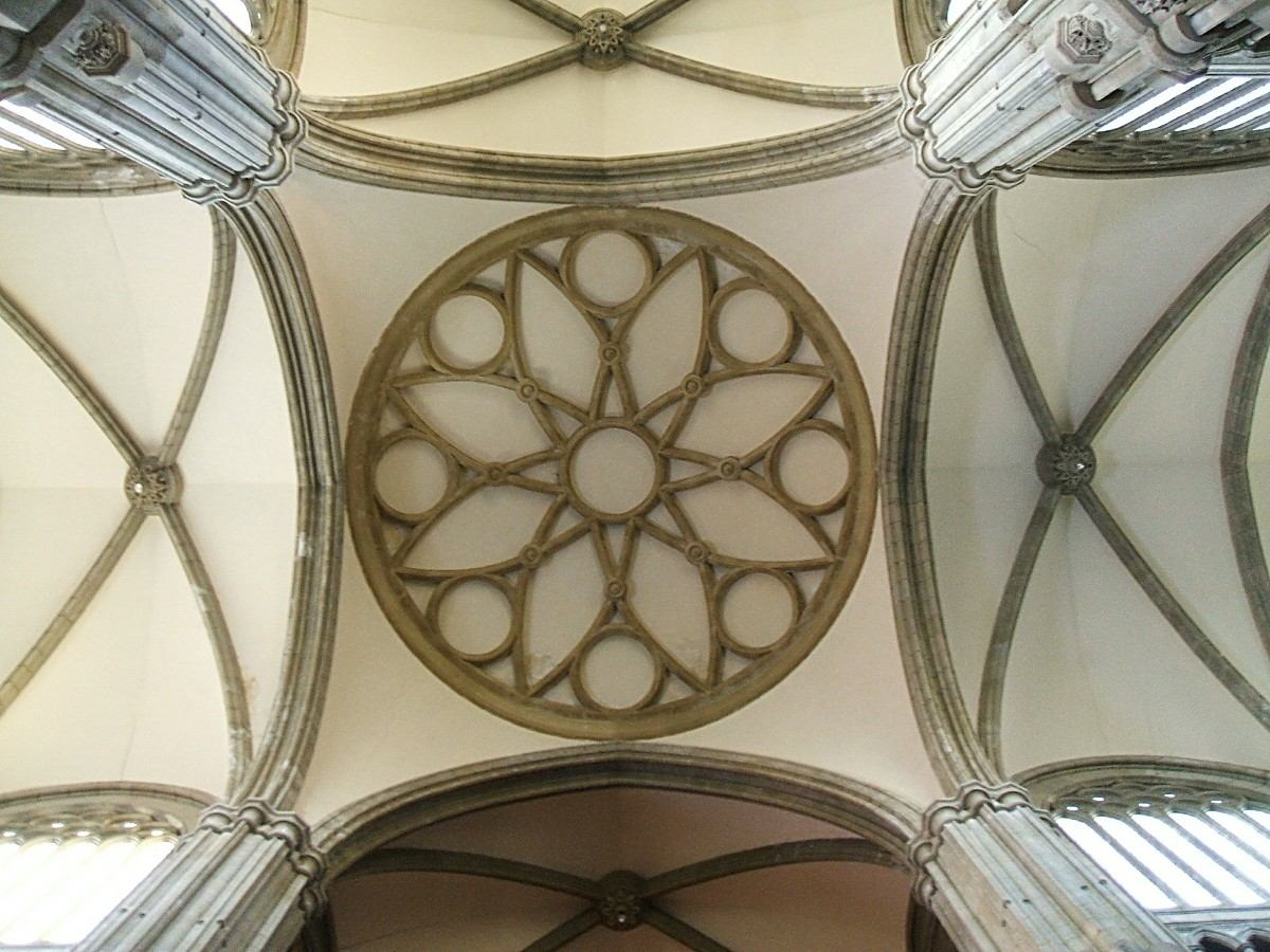 Bóveda del crucero de la Catedral de Vitoria-Gasteiz